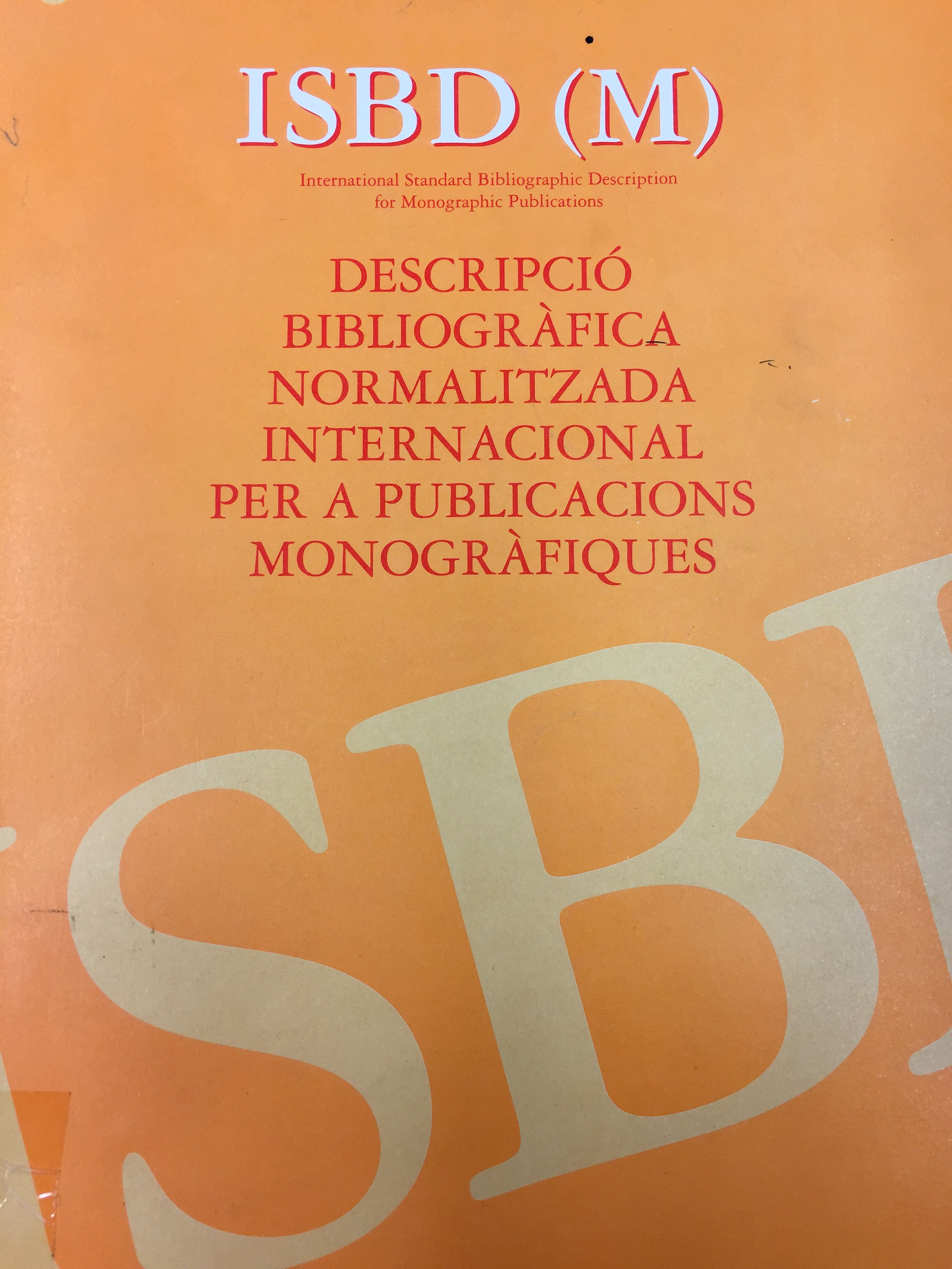 Portada d'un exemplar de normes de descripció bibliogràfica